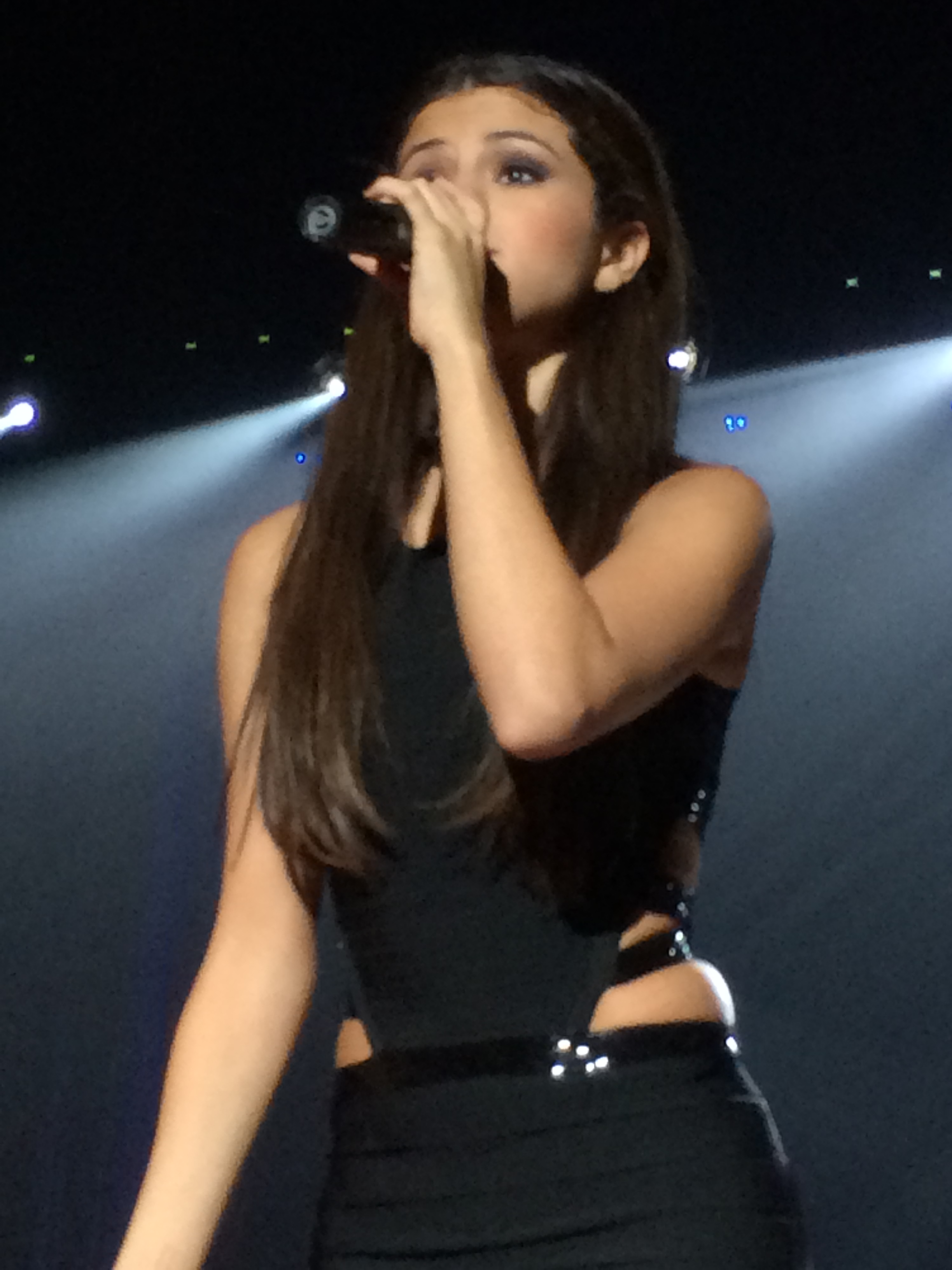 Selena Gomez StarsDance Nov 2013 San Diego